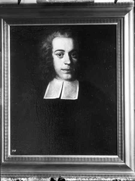 Porträtt, olja, föreställande Erik Geringius, 1730. Kategori: (09) PorträttPorträtt, olja, föreställande Erik Geringius, 1730.